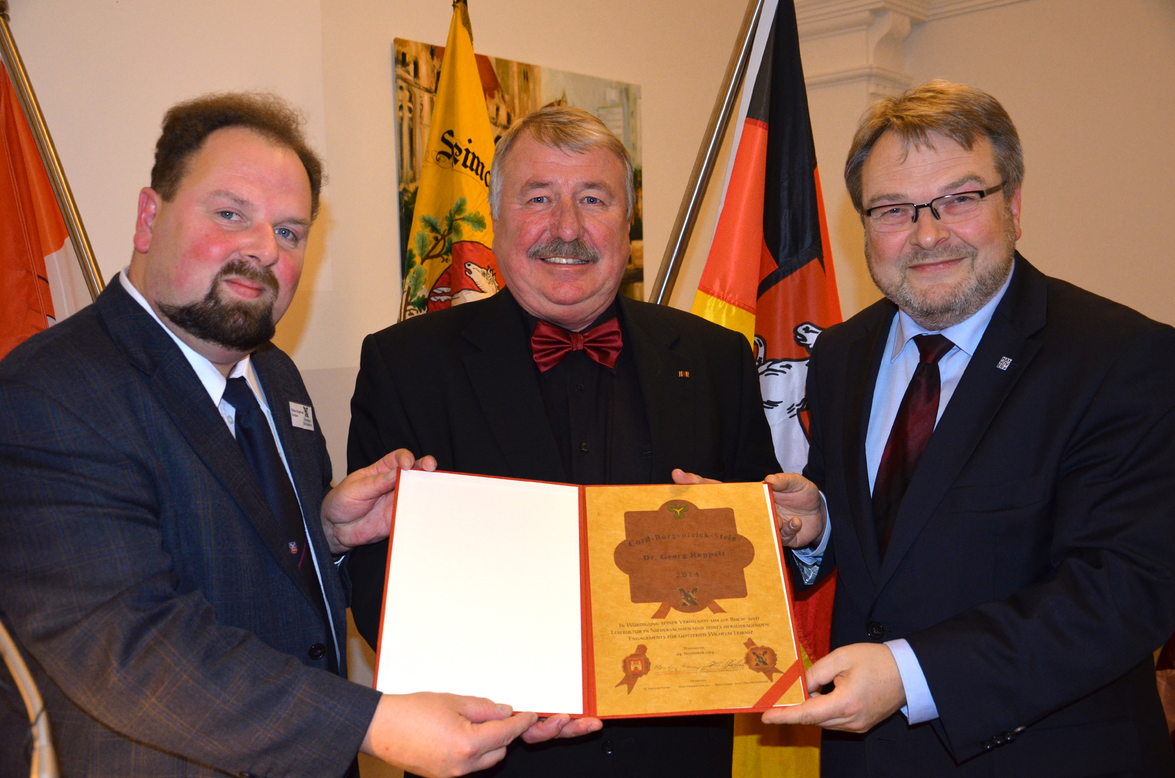 Nach den Festreden zur Verleihung des Cord-Borgentrick-Steines am 24. November 2014 im Gartensaal vom Neuen Rathaus in Hannover stellten sich, hier mit der Urkunde, den Fotografen (von links): Heinz-Siegfried Strelow, Präsident des Heimatbundes Niedersachsen, Georg Ruppelt, der geehrte Direktor der Gottfried Wilhelm Leibniz Bibliothek - Niedersächsische Landesbibliothek, sowie der Erste Bürgermeister der Landeshauptstadt Hannover, Thomas Hermann ...